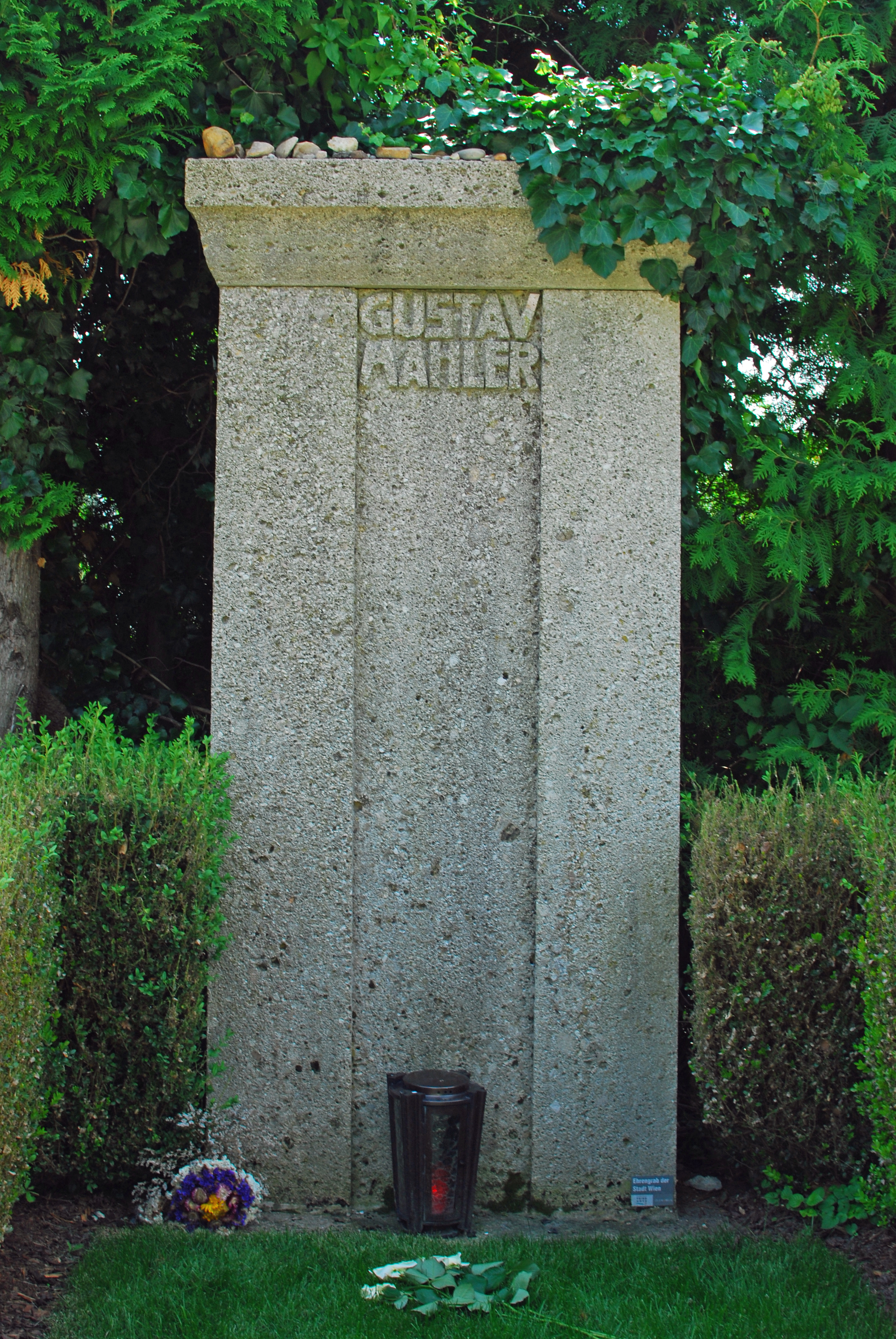 v Mahler, österreichischer Komponist